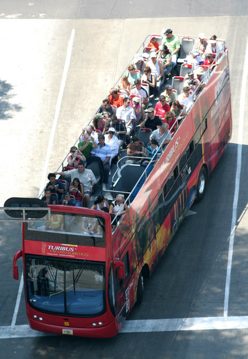 Turibus Ciudad de México. Vista desde Arriba.